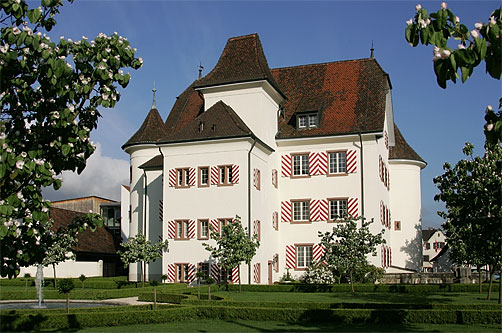 Schloss in Aesch, Kanton Basel-Landschaft